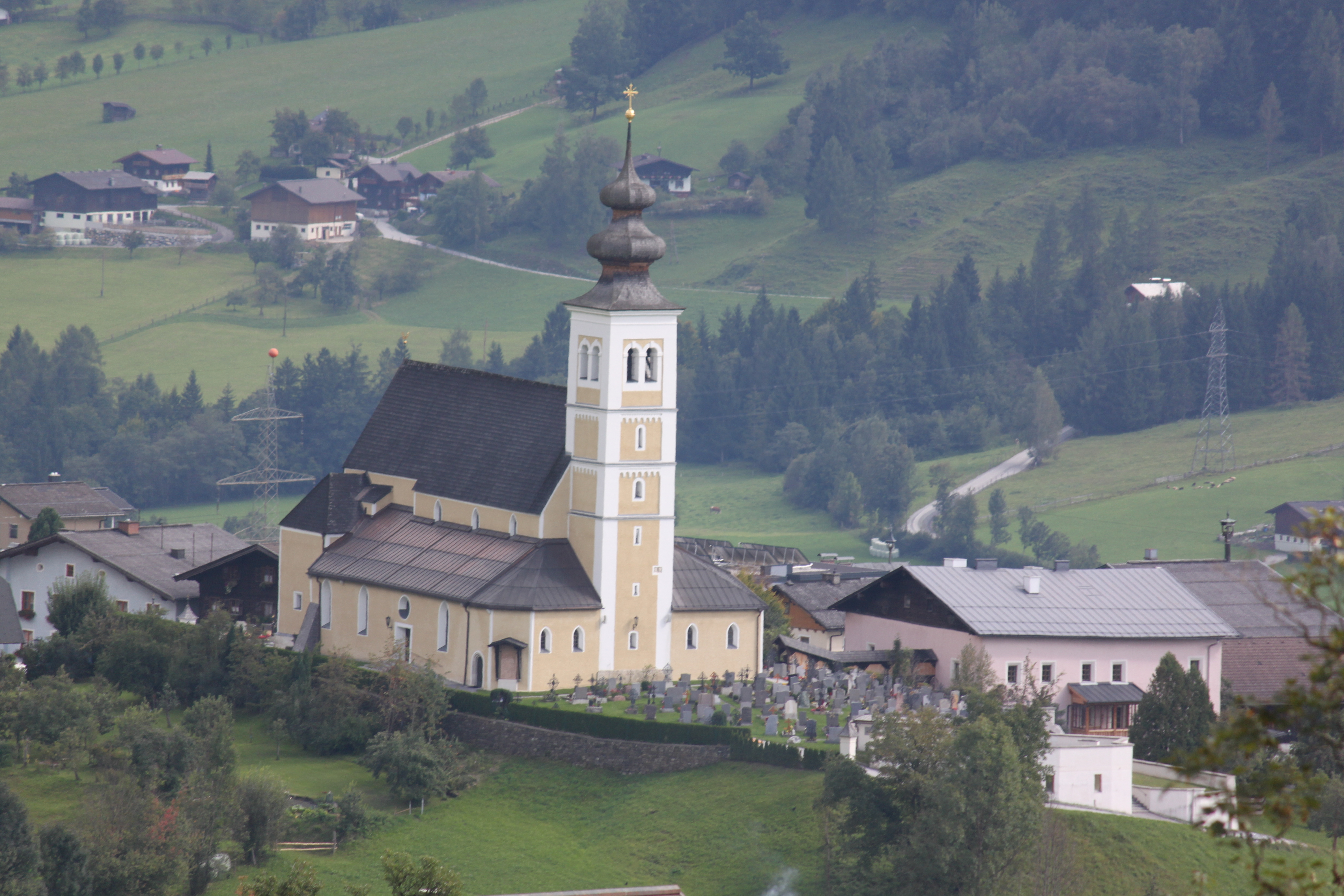 Kath. Pfarrkirche hl. Vitus